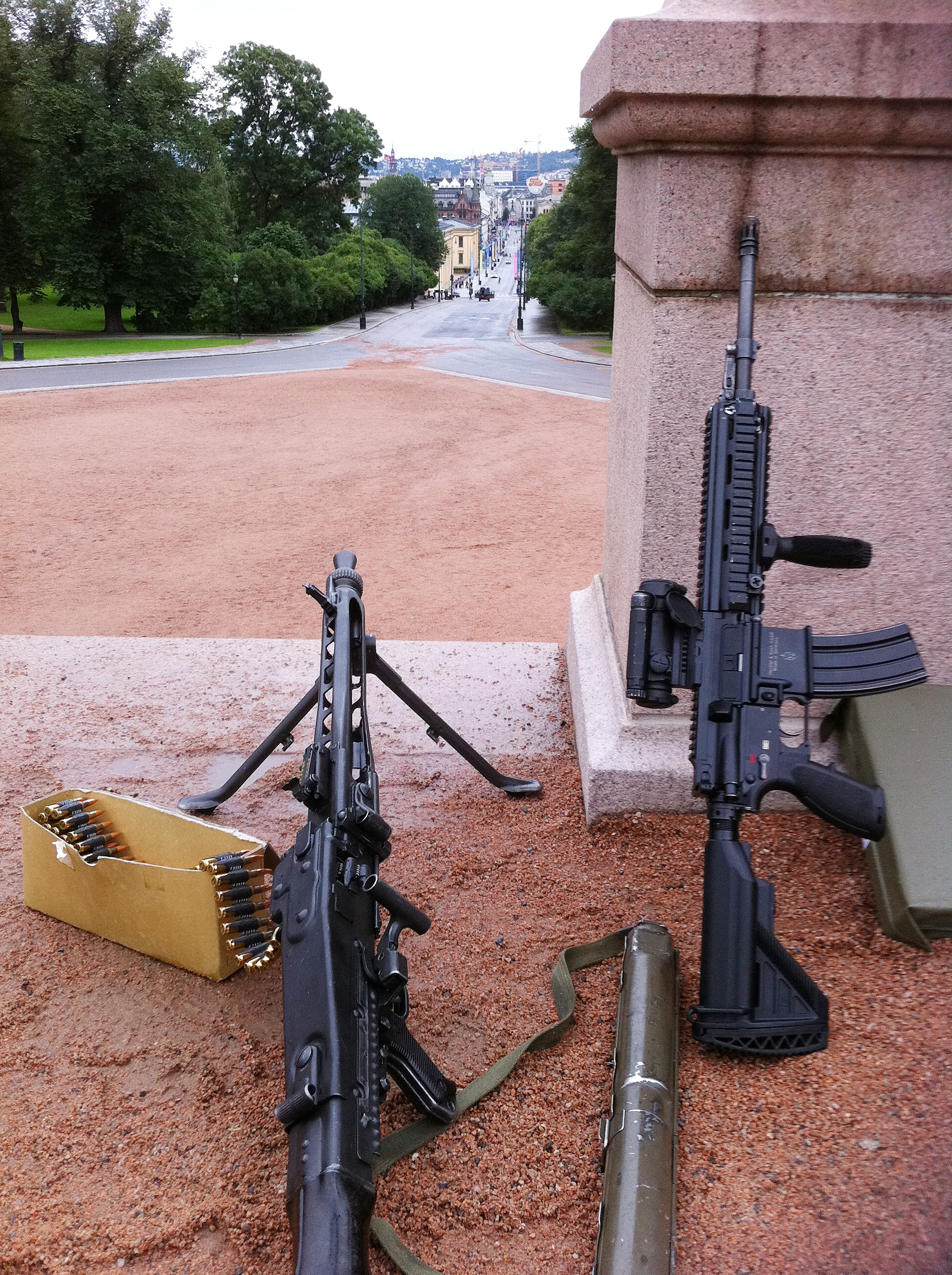 Tungt bevæpnede gardister voktet Slottet etter terrorangrepet den 22. juli. Her ser vi blant annet et MG3-maskingevær og en HK 416 rifle.